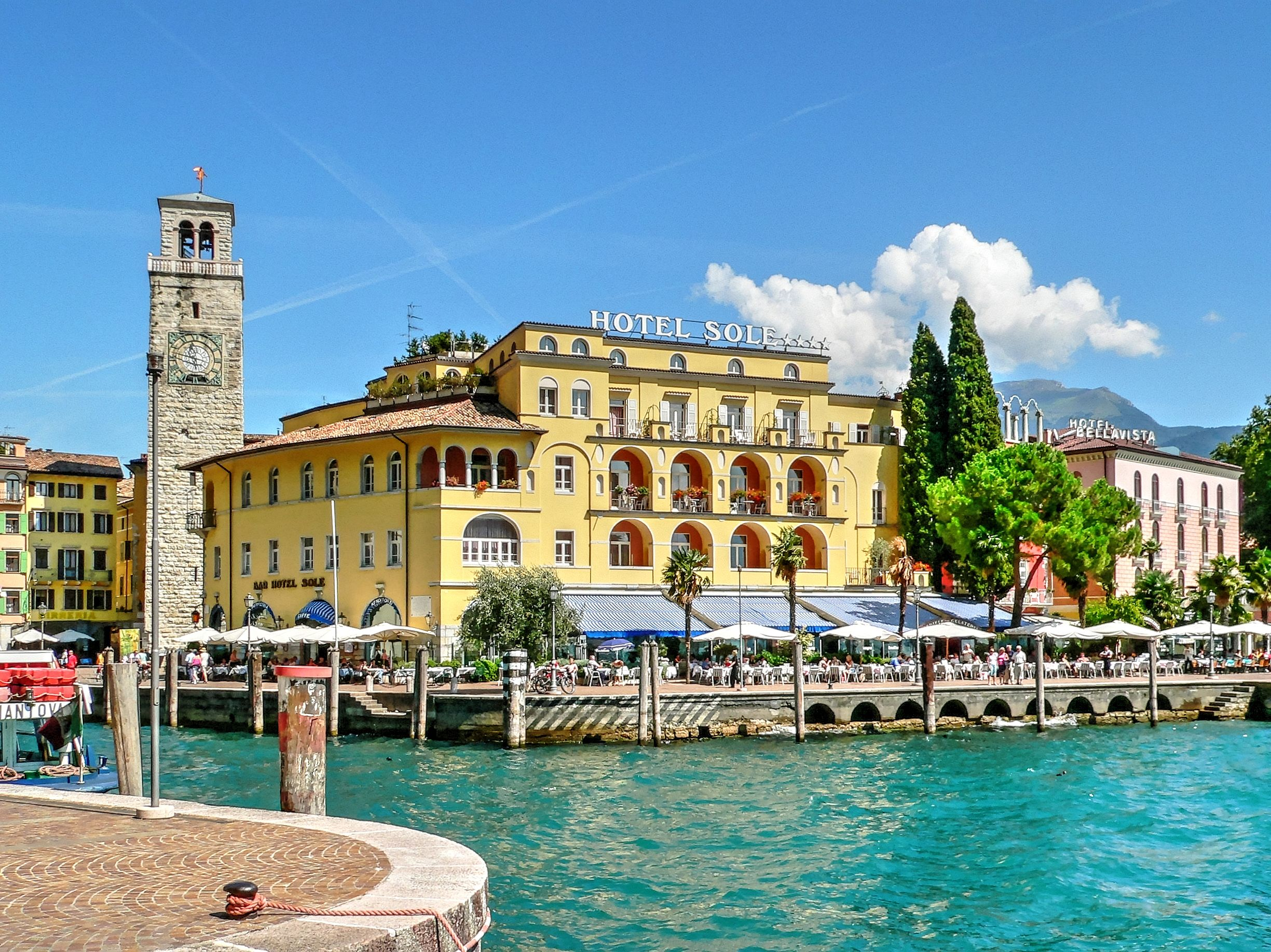 Promanade of Riva del Garda